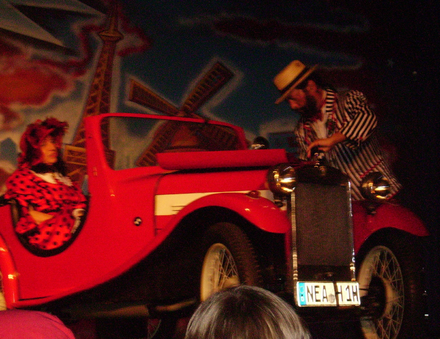 Freizeit-Land Geiselwind near Geiselwind in Franconia (Germany)